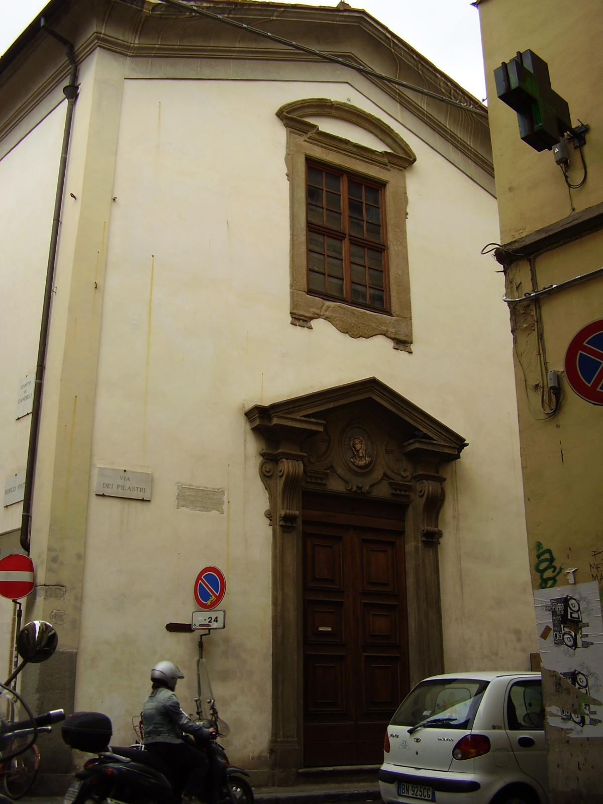 Santa Maria dei Candeli façade, church in Florence Italy